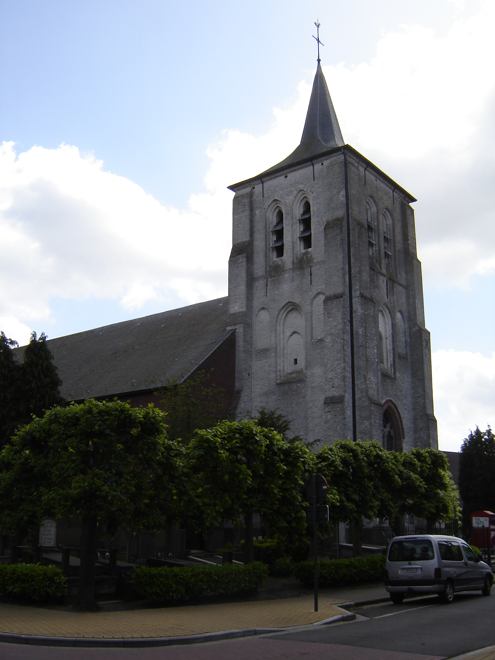 Sint-Laurentiuskerk in Zedelgem Church of Saint Lawrence, West Flanders, Belgium